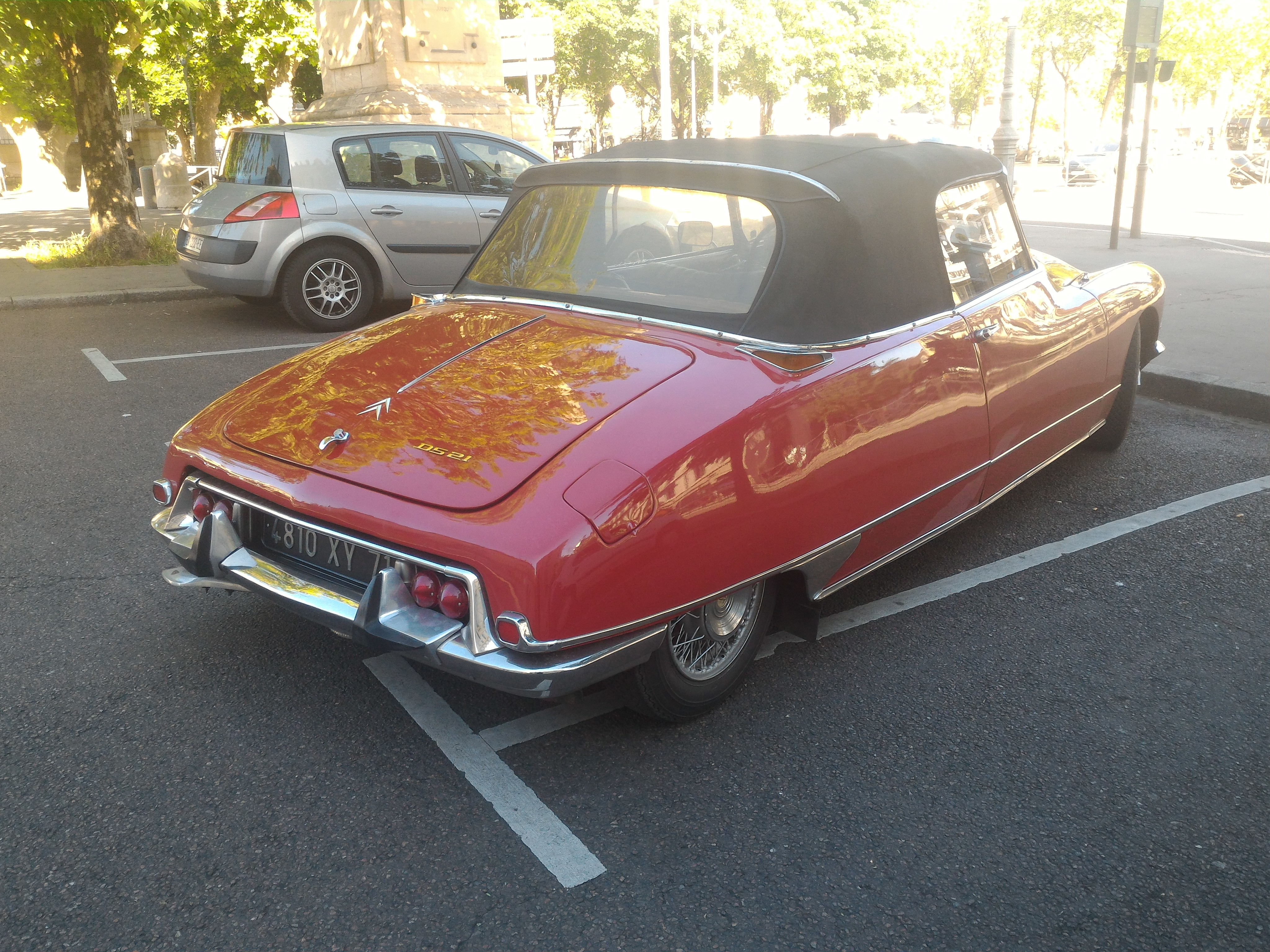 Citroen DS 21 Cabriolet at Chalon sur Saone